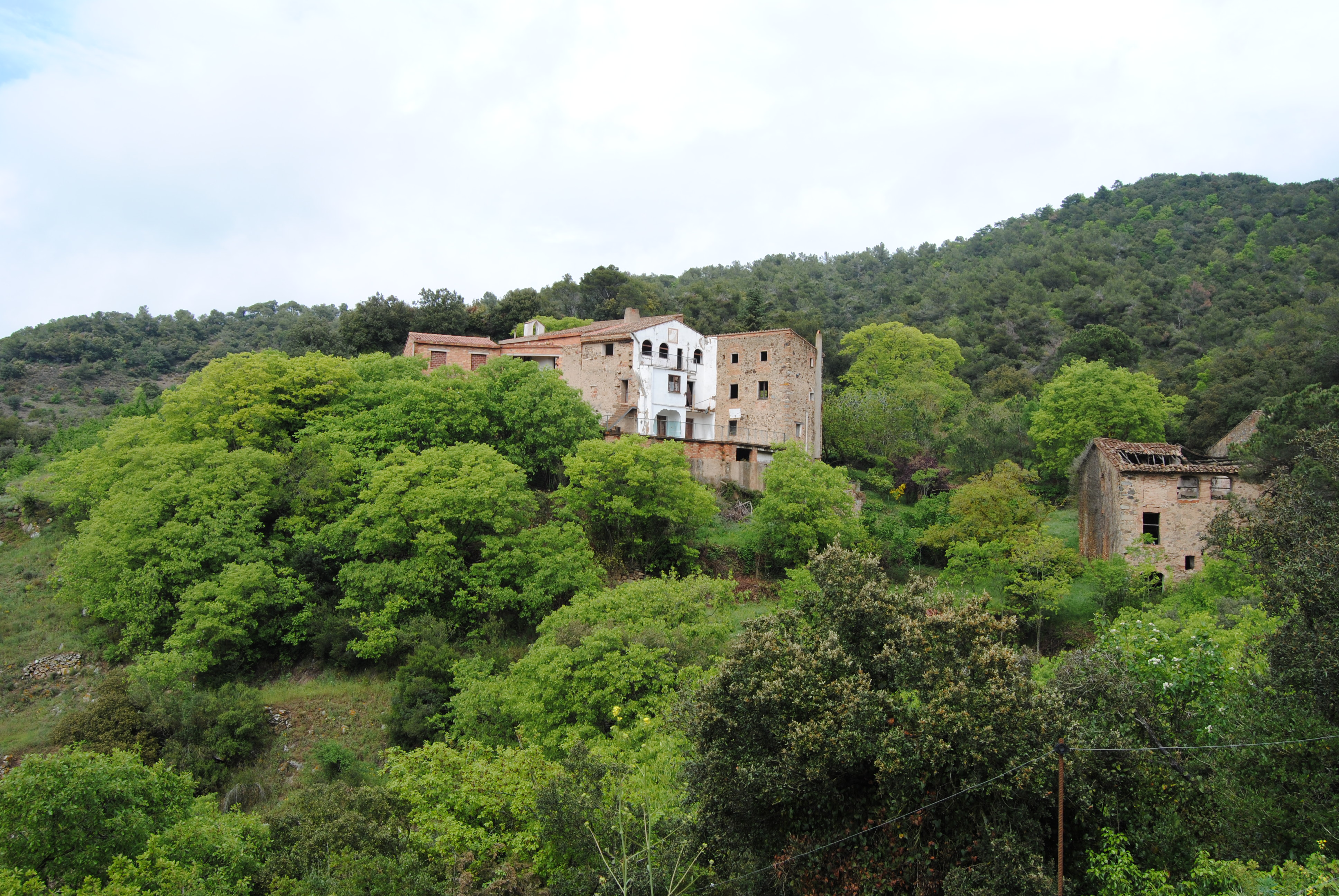 Mas d'en Mestre situat a Cortiella (Alforja)